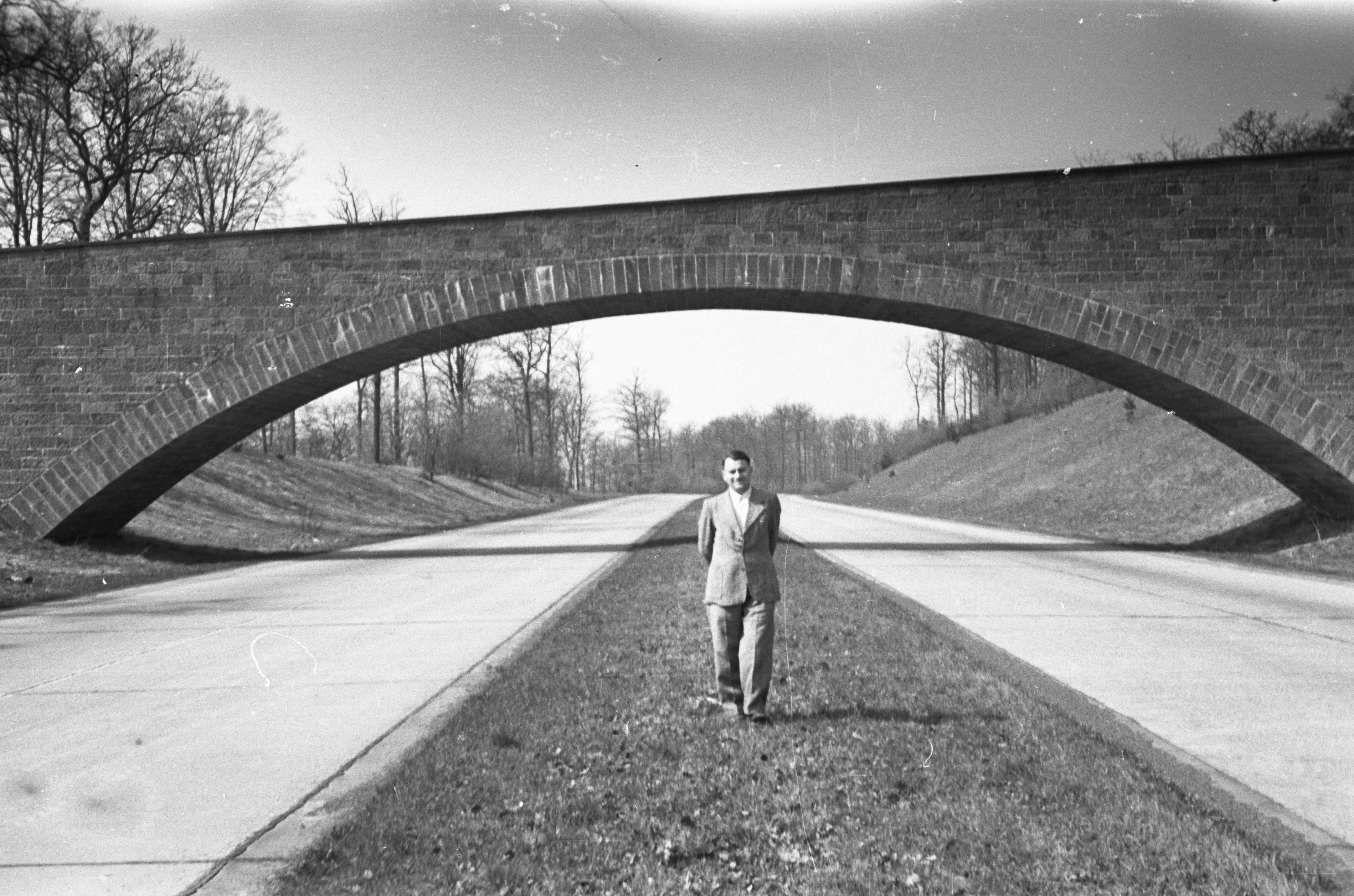 Bundesautobahn A5 bei Alsfeld-Eifa im Jahr 1949. Die Brücke existiert noch (2011) und steht unter Denkmalschutz.